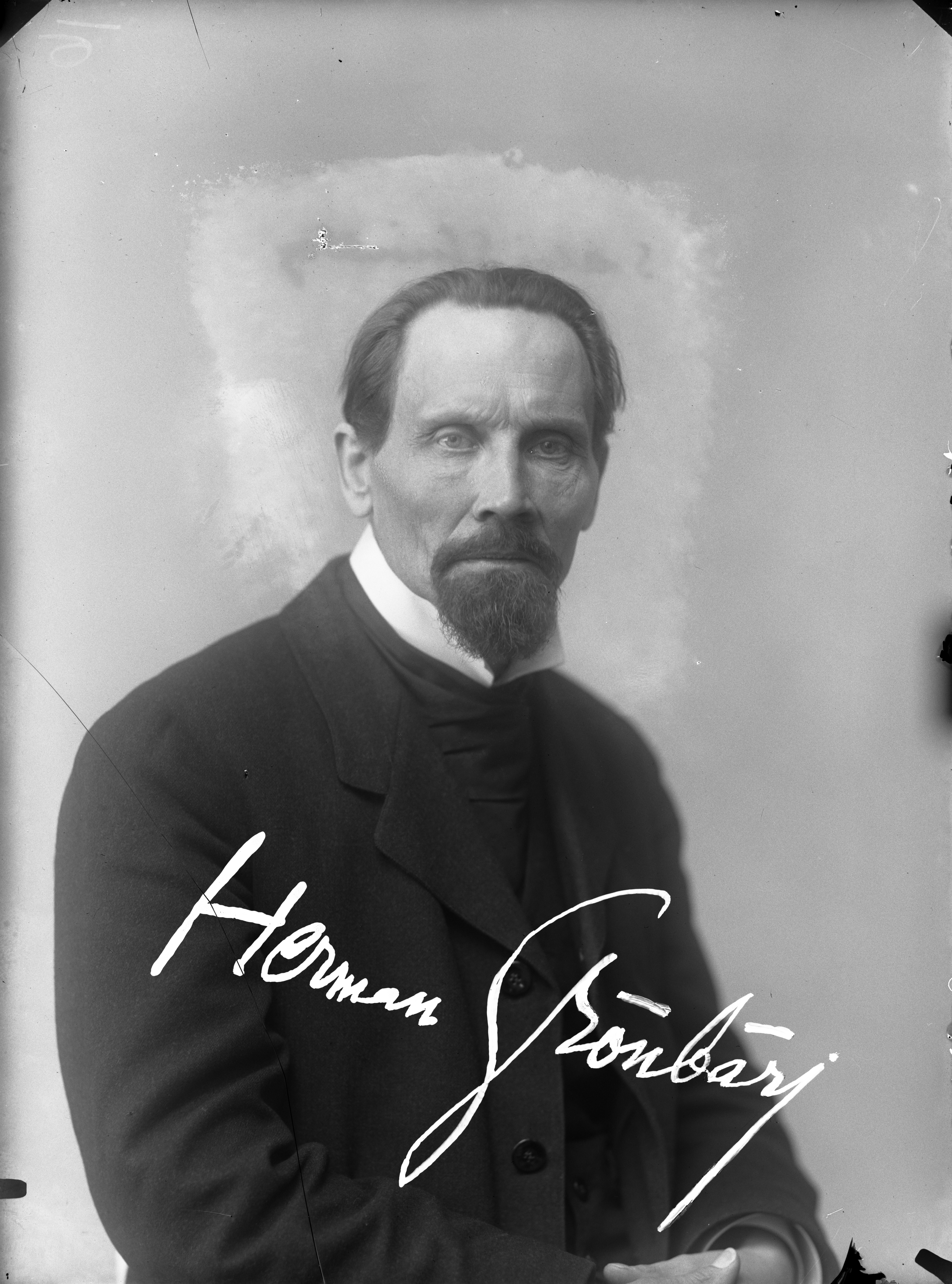 Herman Grönbärj